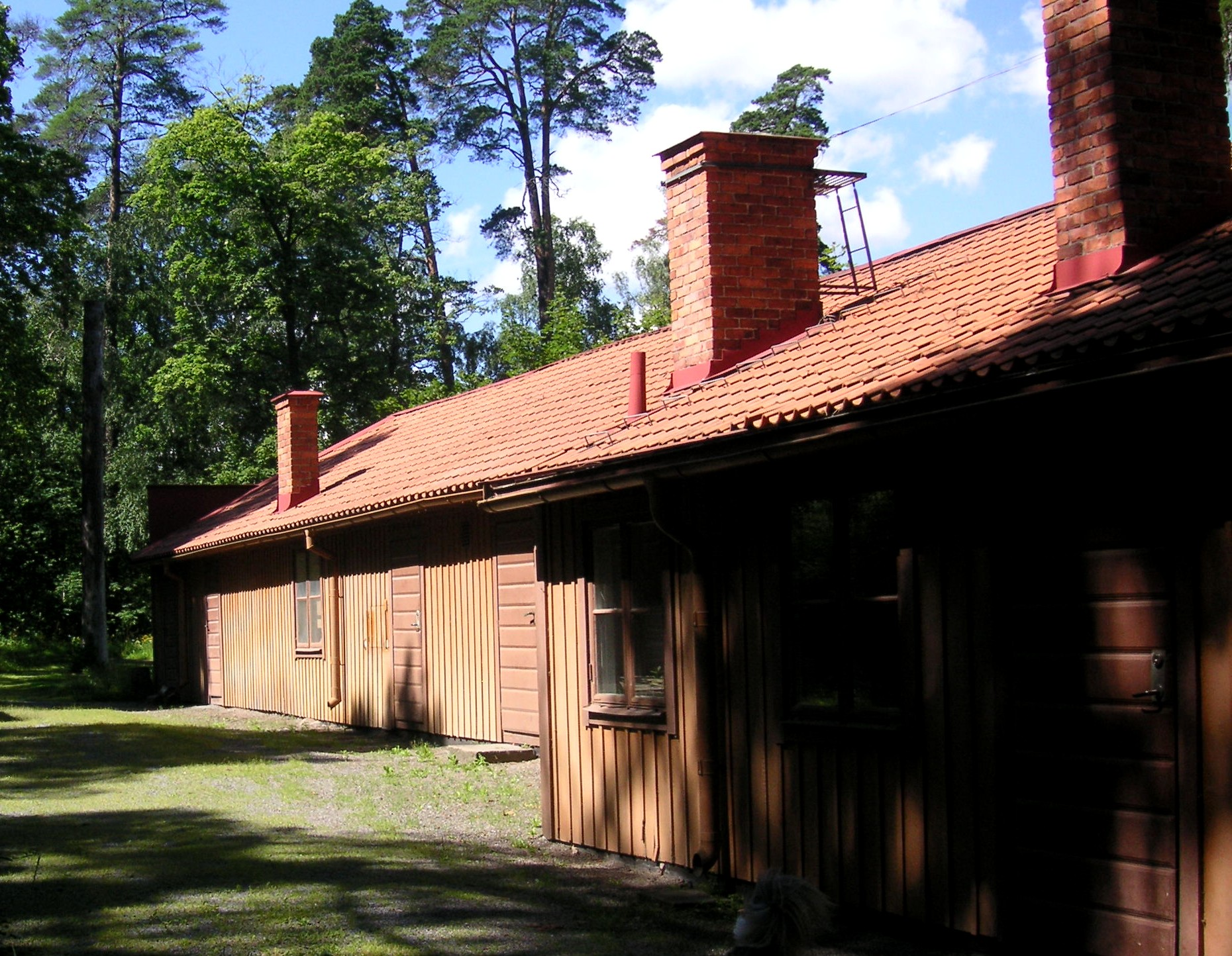 Finnstugorga i Hagaparken